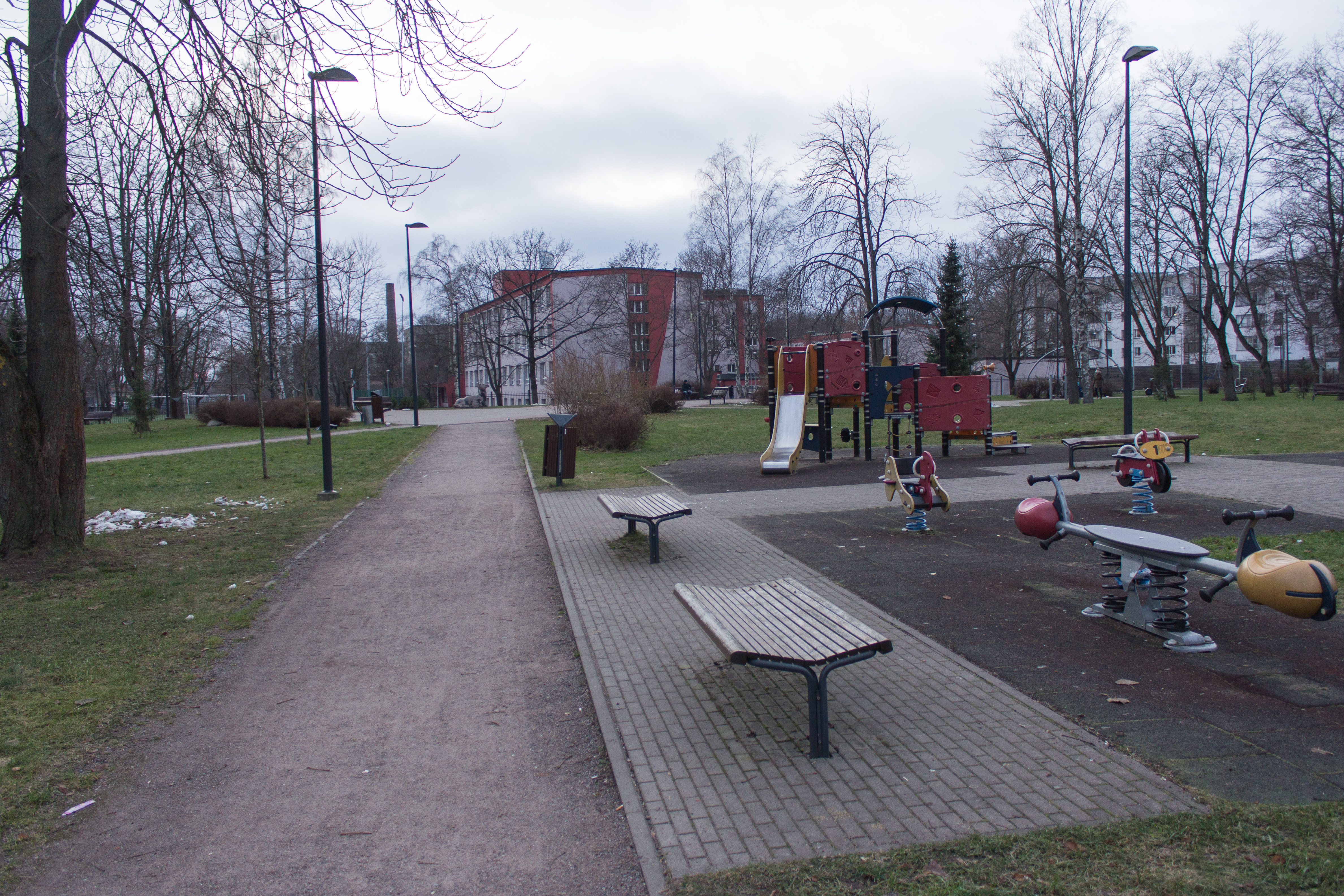 Karjamaa park (Karjamaa tänav 3)